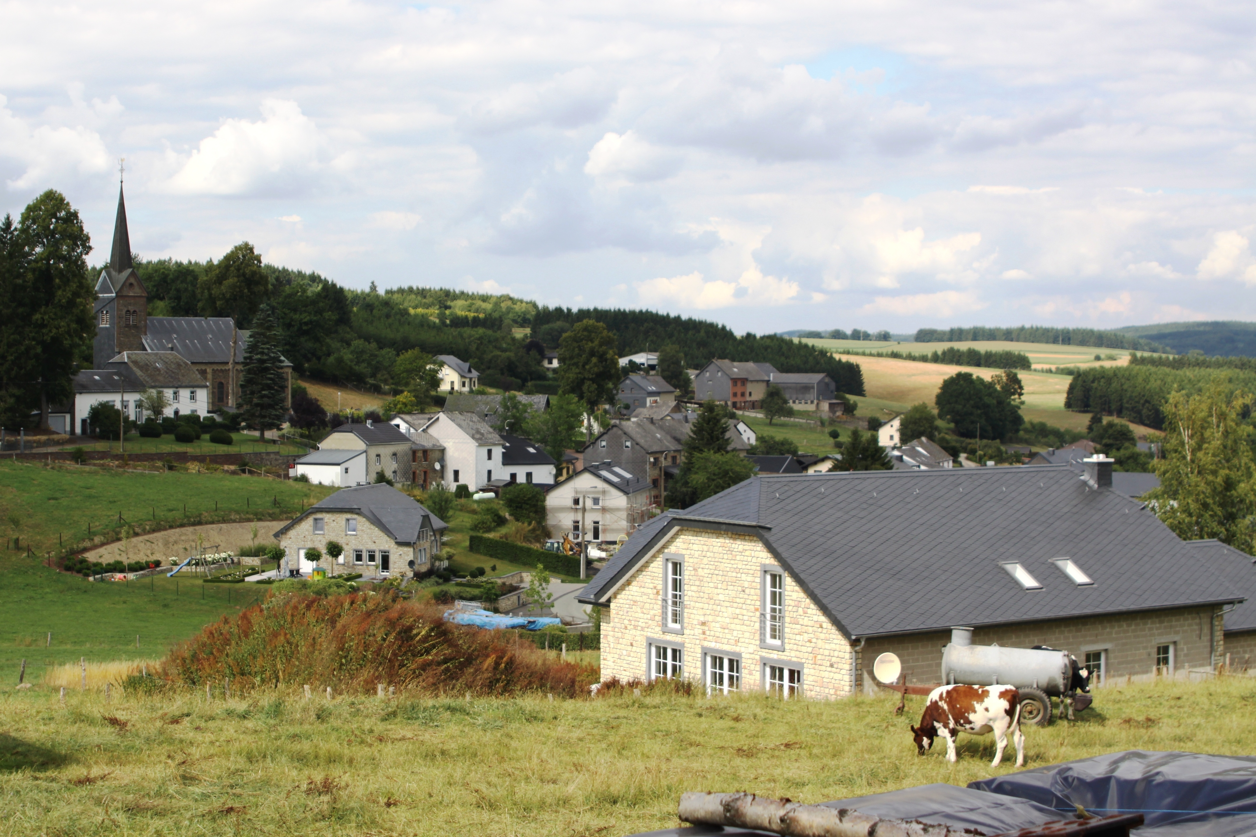 Dürler am August 2010.